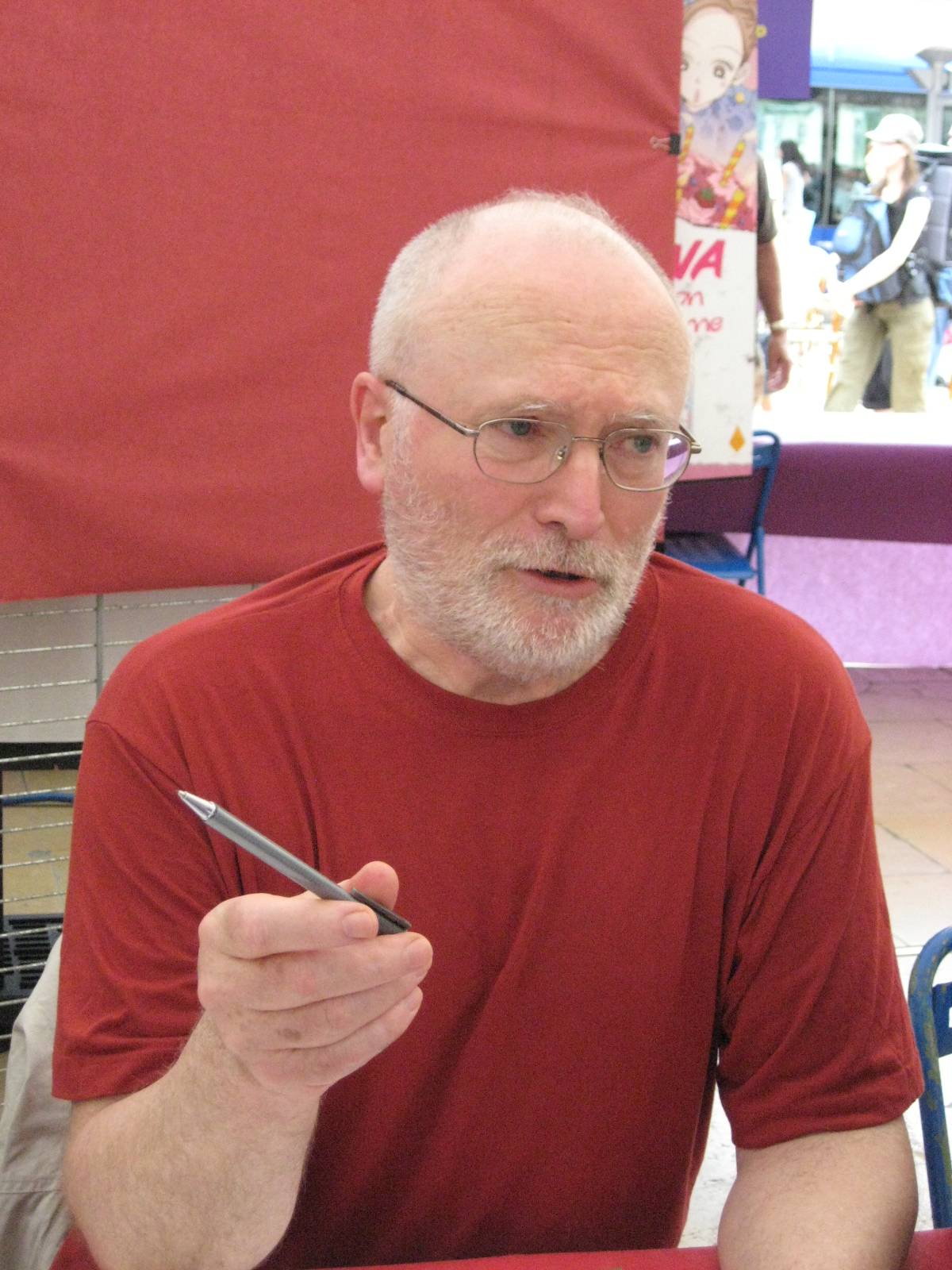 L'illustrateur Caza, à la Comédie du livre de Montpellier, 23 mai 2009